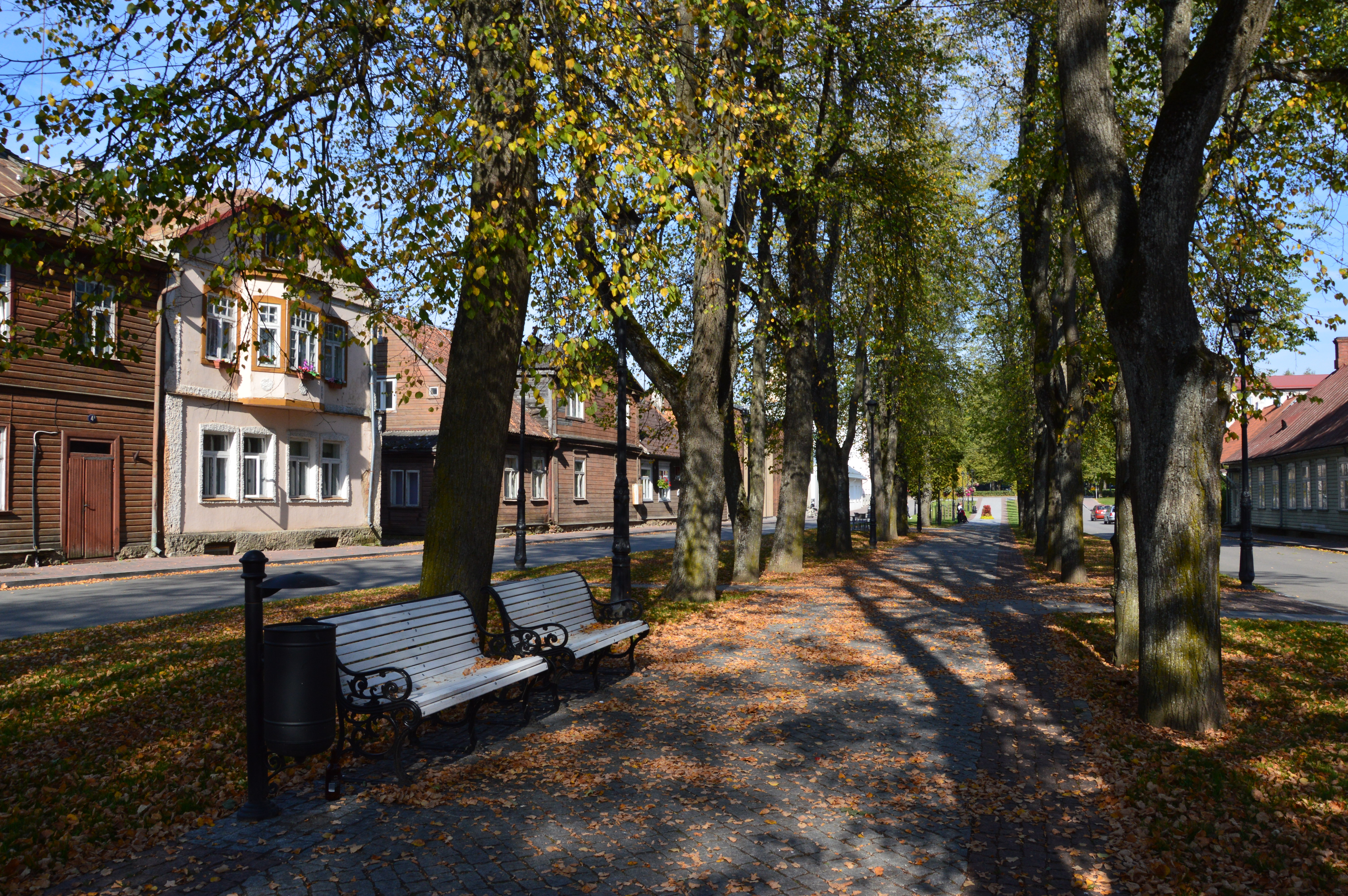 Katariina allee Võrus